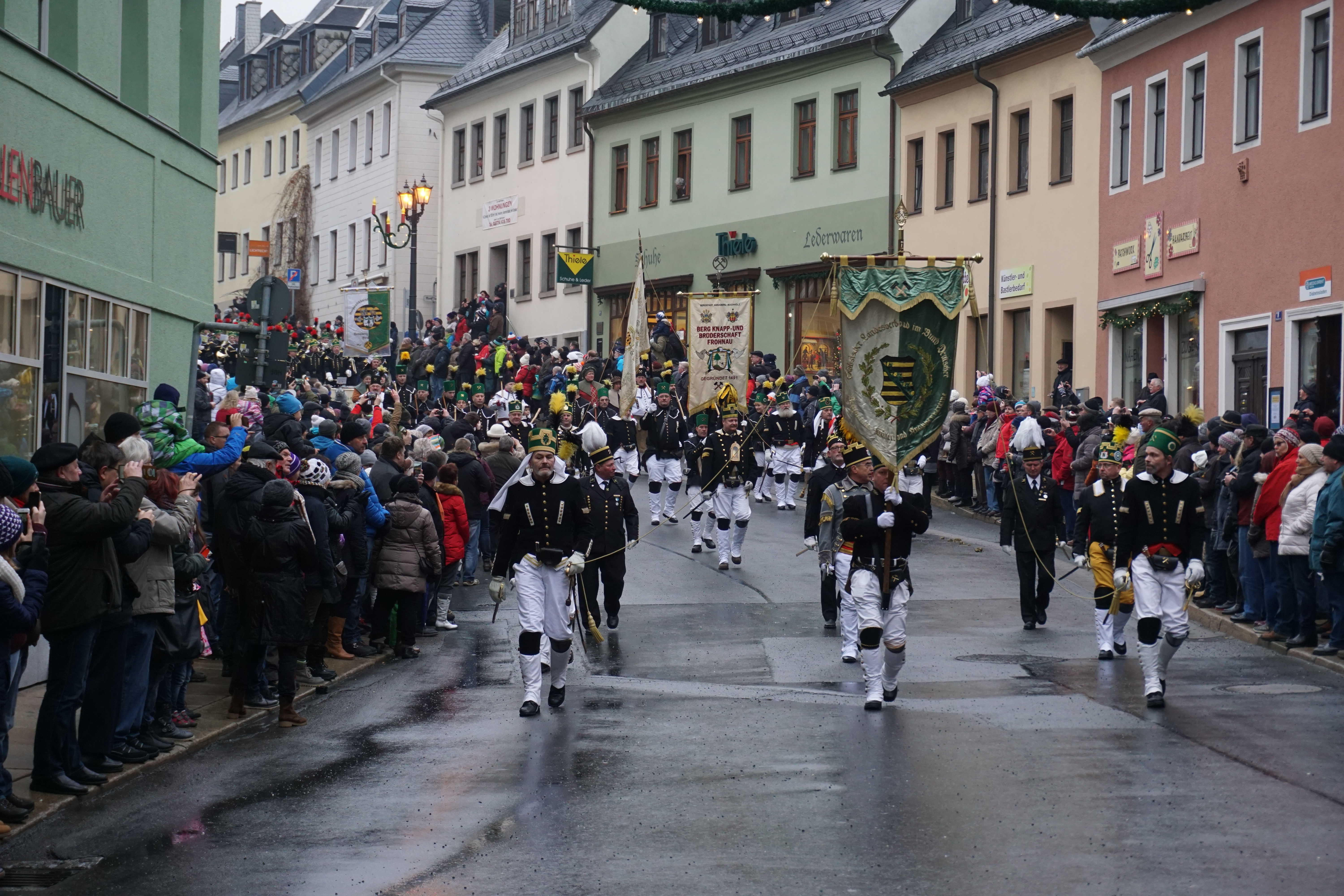 Bergparade in Annaberg-Buchholz 2016, Eröffnung der Parade durch den sächsischen Landesverband im Bund Deutscher Bergmanns, Hütten und Knappenvereine